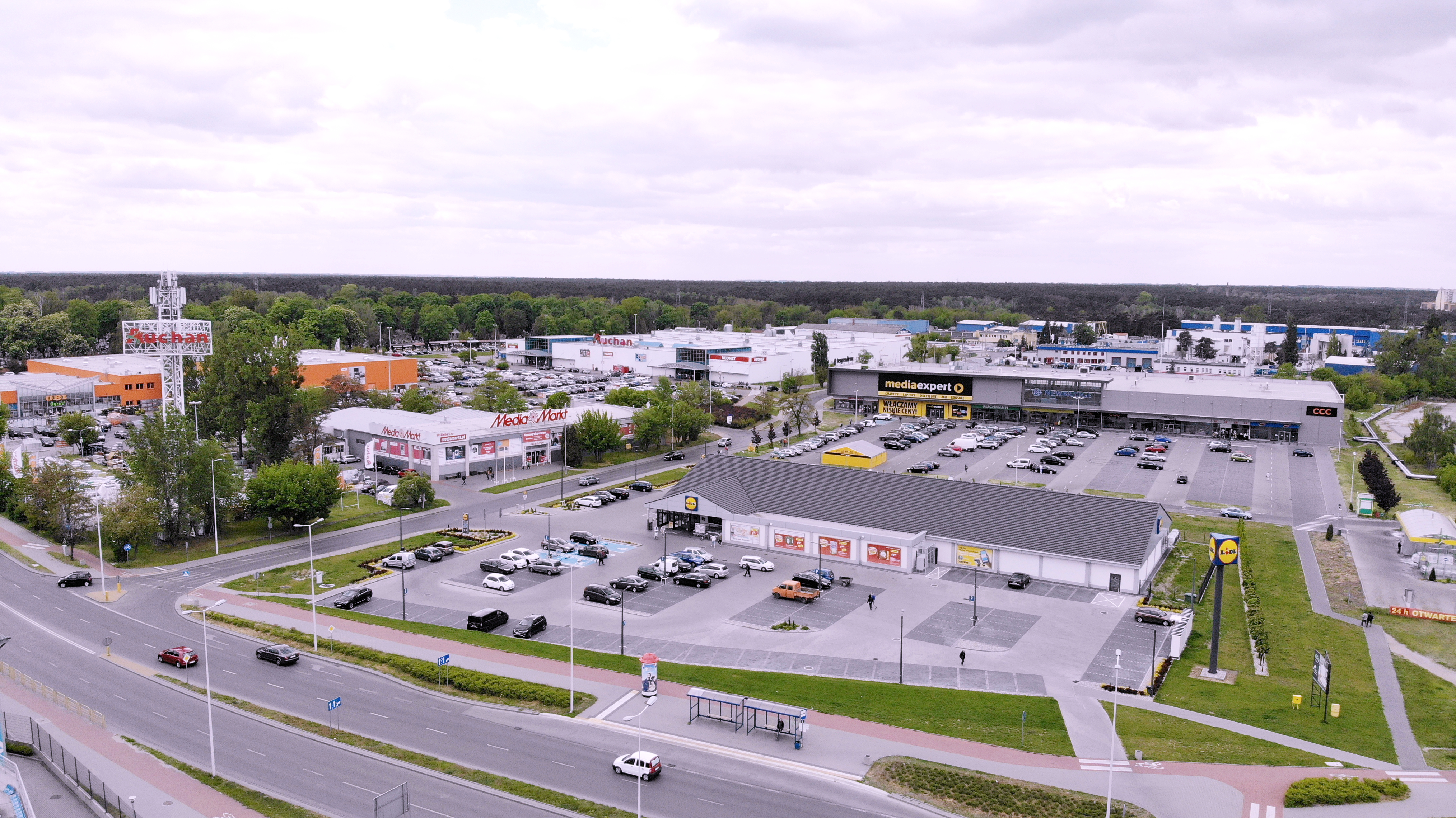 Styk Śródmieścia i Kazimierza Wielkiego (2020 r.)